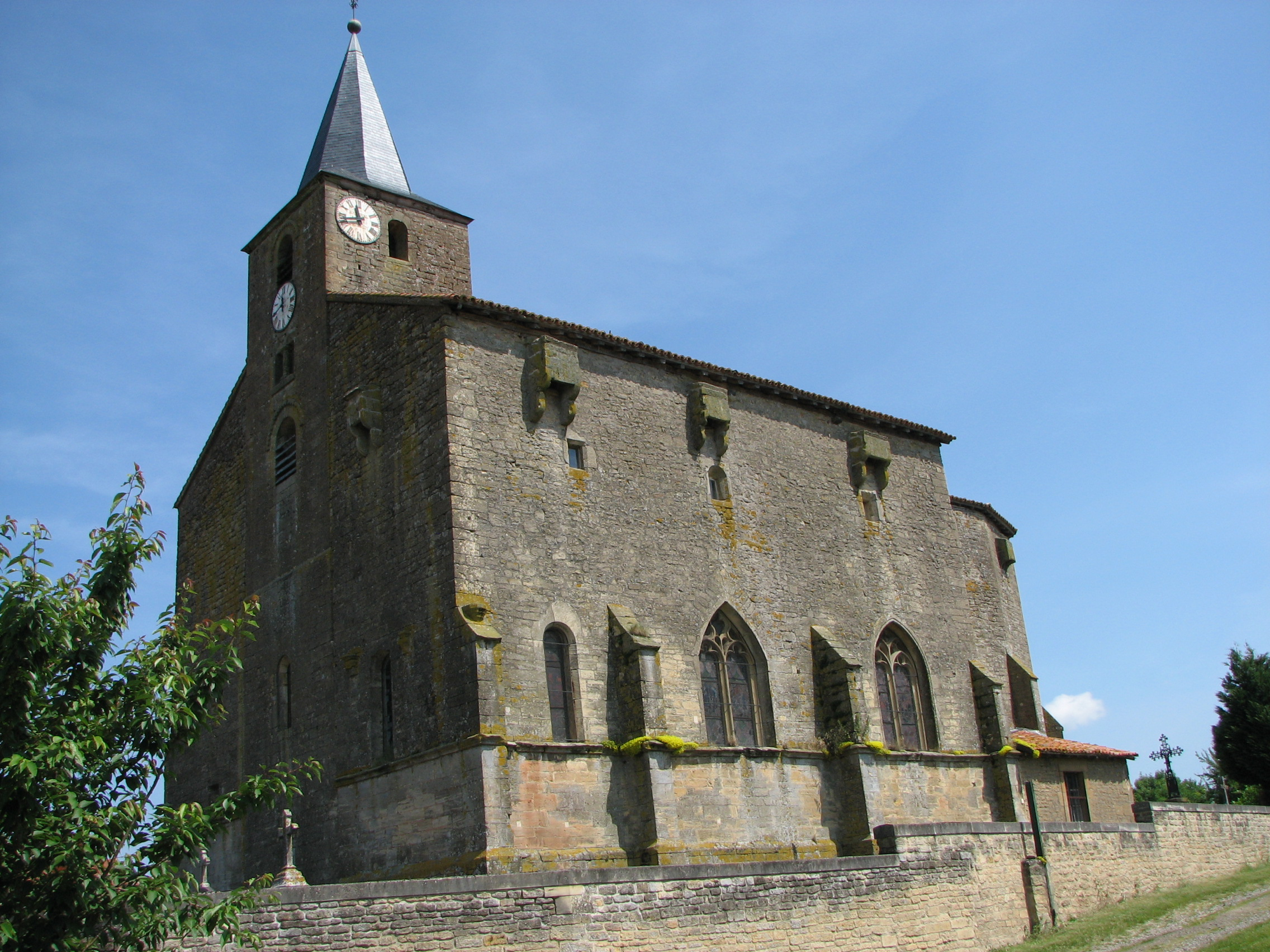 Eglise fortifiée du XVIe siècle de Saint-Pierrevillers dans la Meuse